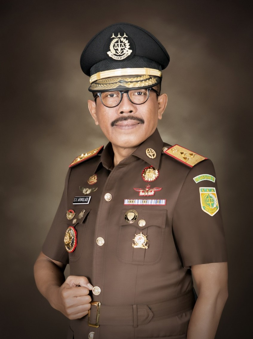 Foto Resmi Wakil Jaksa Agung RI